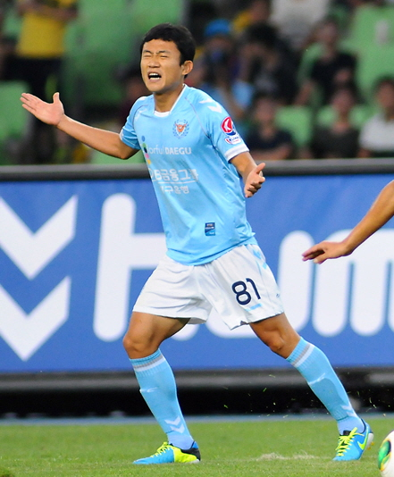 대구 FC 최원권